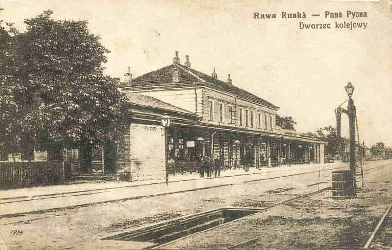 Залізничний двірець у Раві-Руській, Львівщина, Україна